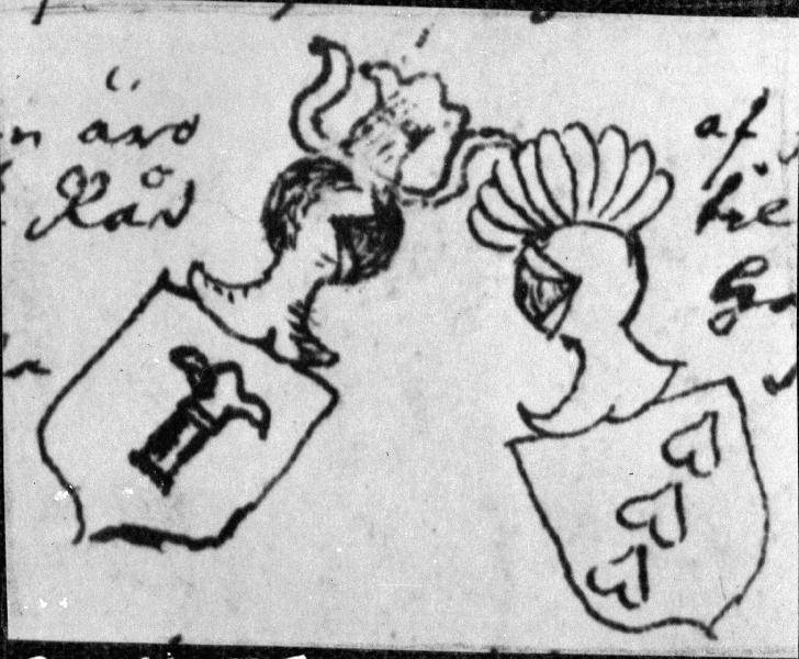 Vasavapnet och äldre Stureättens vapen. Foto av teckning i Uppsala Bibliotek, signerad O.1. Kategori: (03) KalkmålningarVasavapnet och äldre Stureättens vapen. Foto av teckning i Uppsala Bibliotek, signerad O.1.